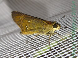 Borbo borbonica (Boisduval, 1833)